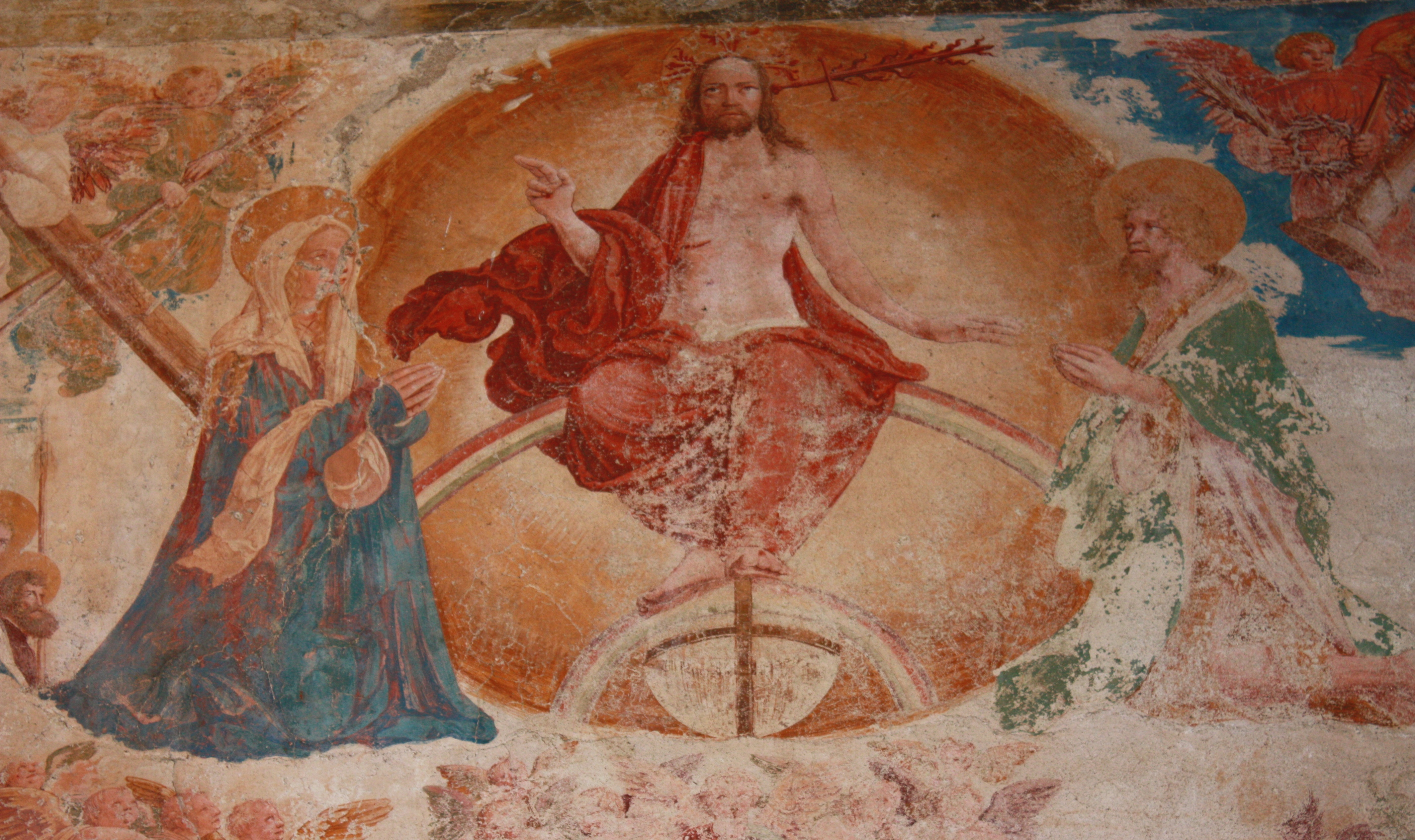 detail 1